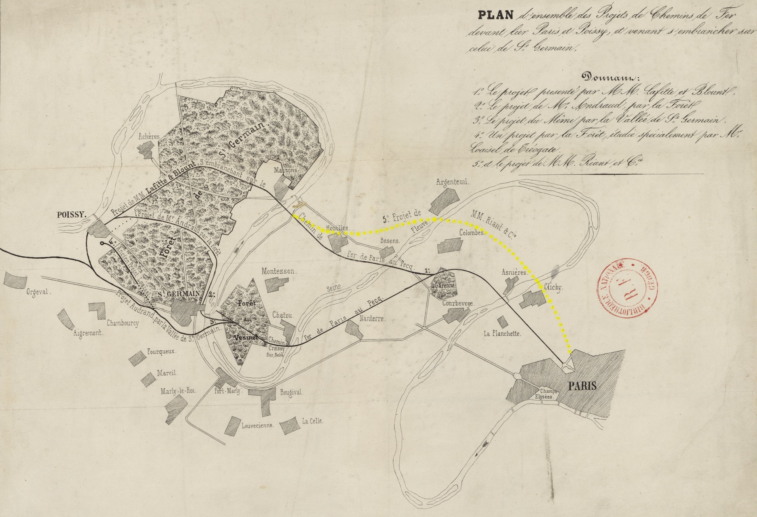 Plan d'ensemble des projets de chemin de fer devant lier Paris et Poissy et venant s'embrancher sur celui de St-Germain